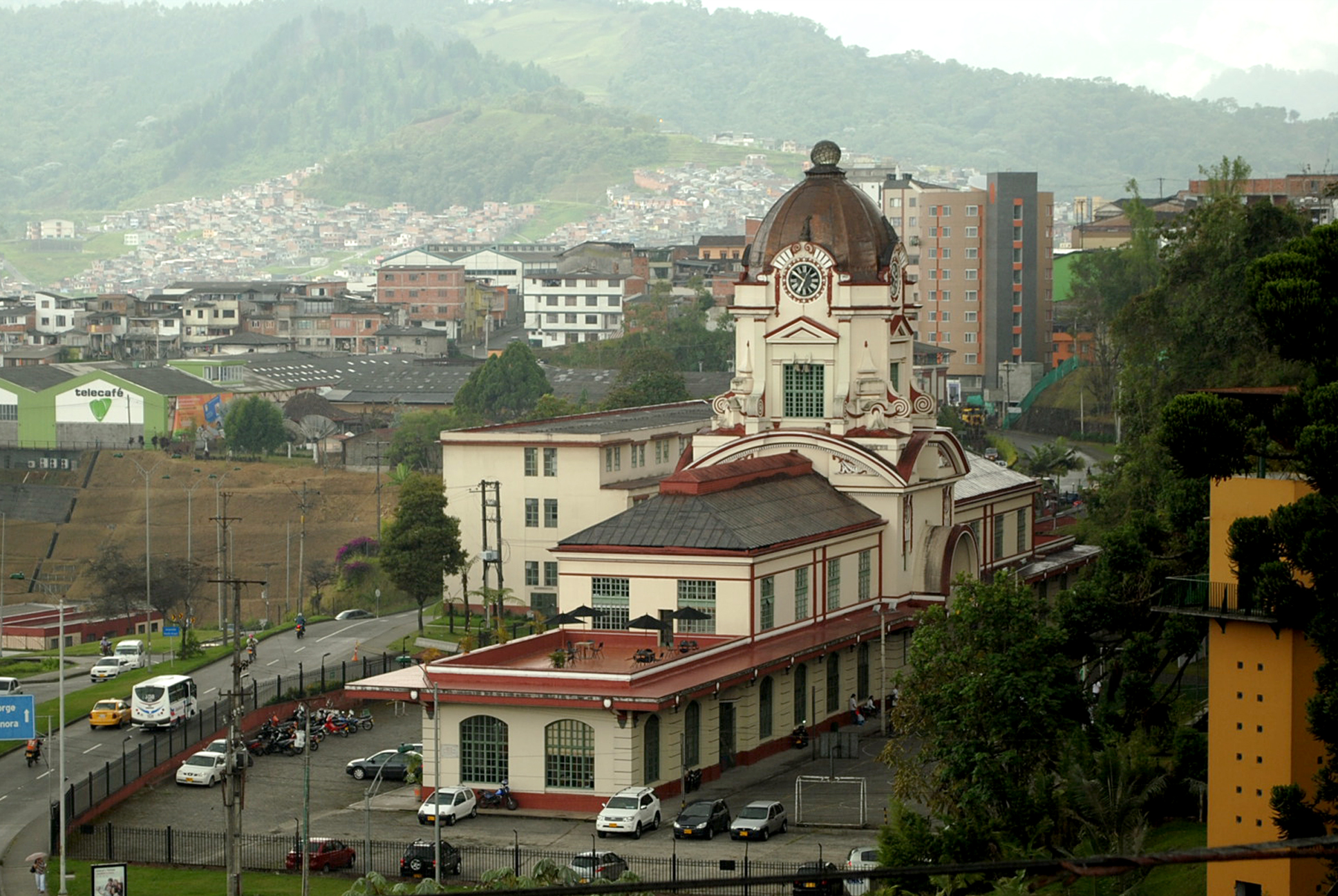 Vista General de la sede de la Universidad Autónoma de Manizales